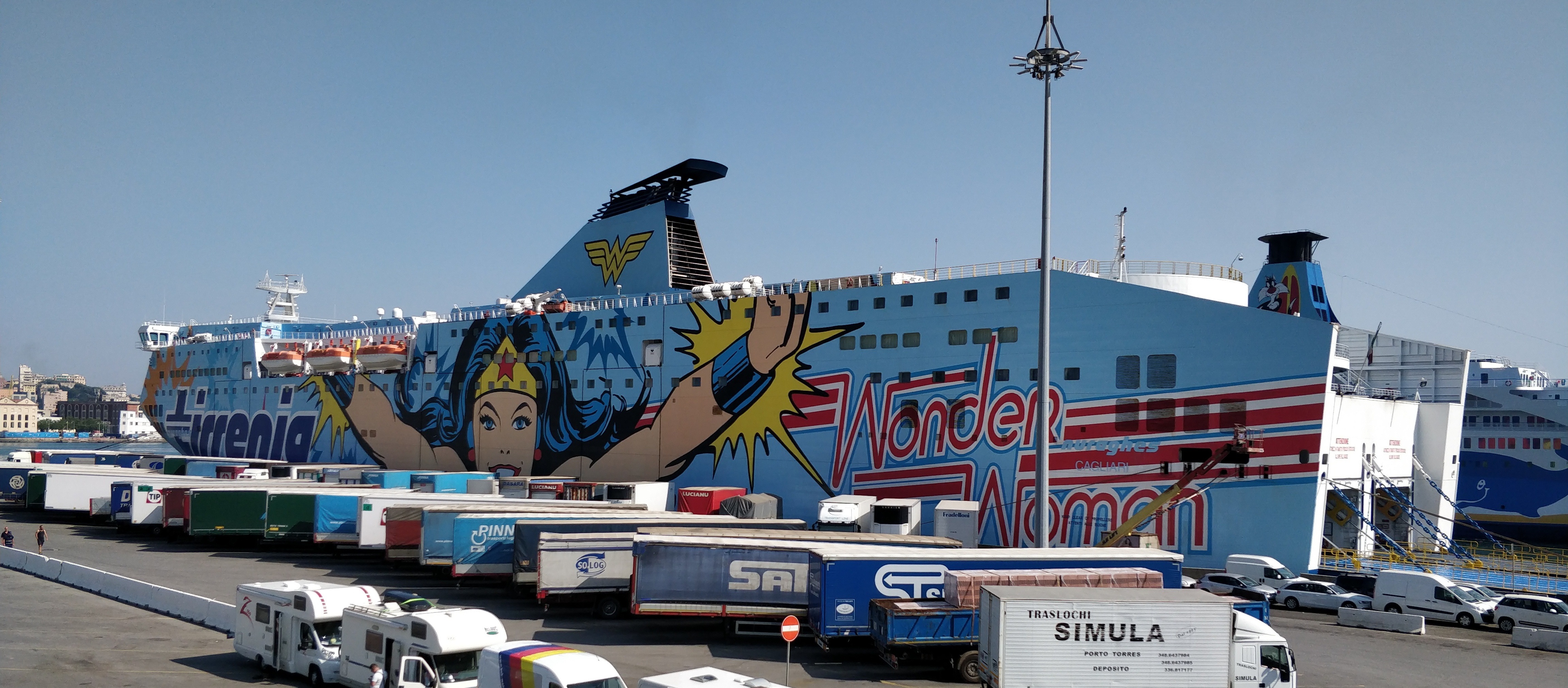 Traghetto Nuraghes con livrea dedicata ai supereroi DC Comics nel porto di Genova nel giugno 2019